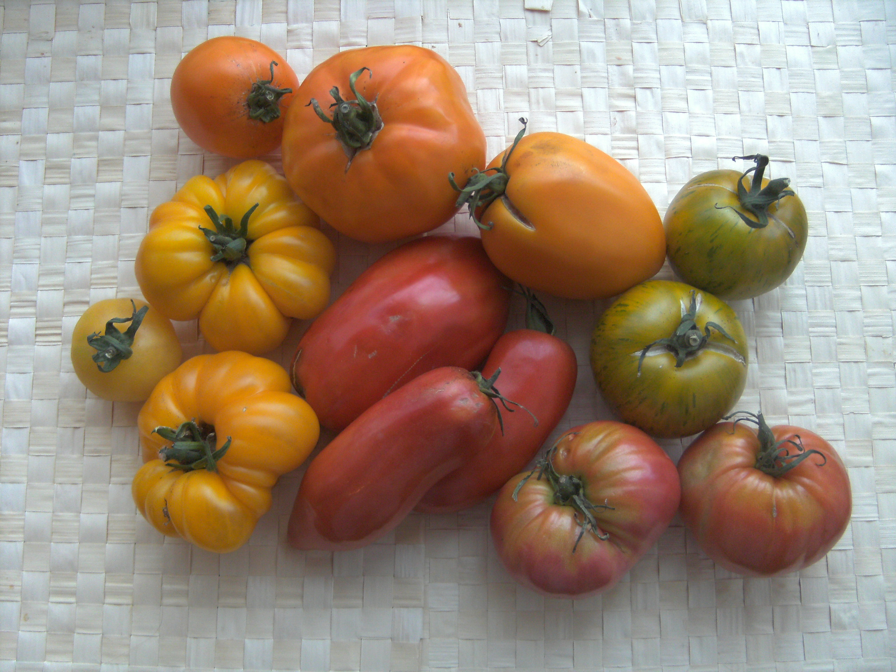 Tomates - diverses variétés de culture biologique à la ferme du Maustichi à Leernes (Fontaine-l'Évêque), près de Charleroi (Belgique)